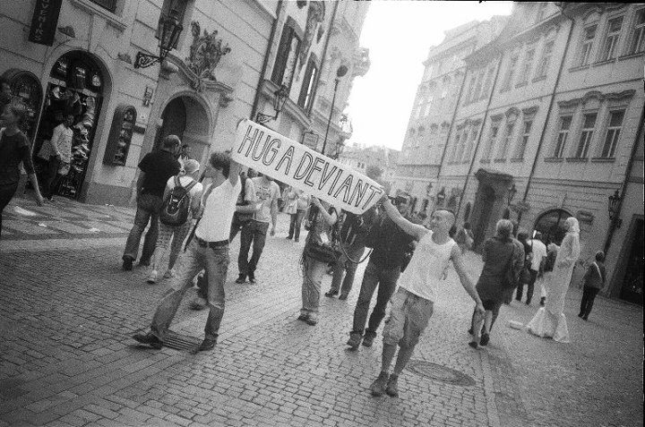 Maty Dio a Dan Stewart, Foto Josef Rabara